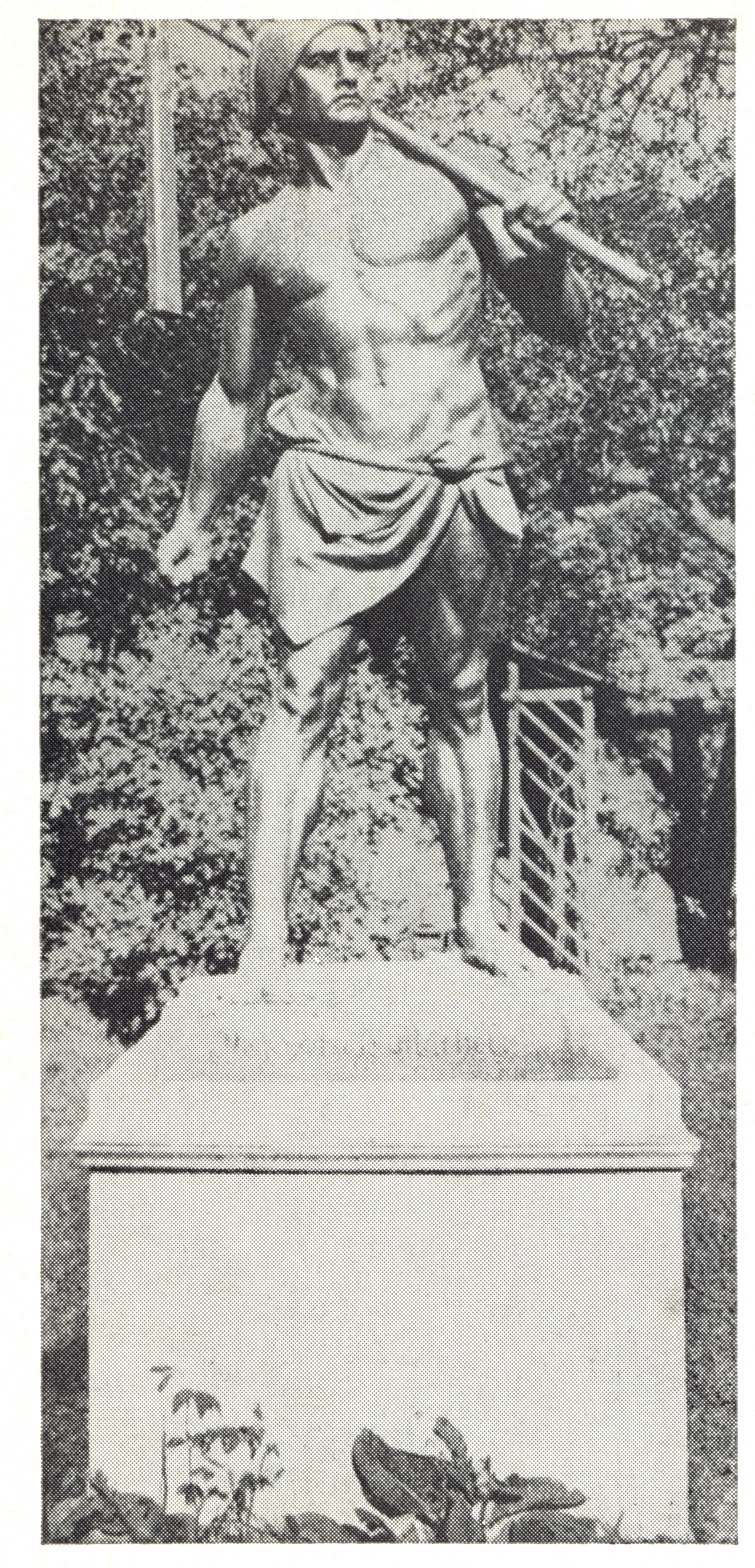 Standbild: "Deutscher Michel", ausgestellt im Garten des früheren Prussia-Museums, Königsstraße 65/67. Geschenk von Johann Friedrich Reusch an Königsberg im Jahre 1904